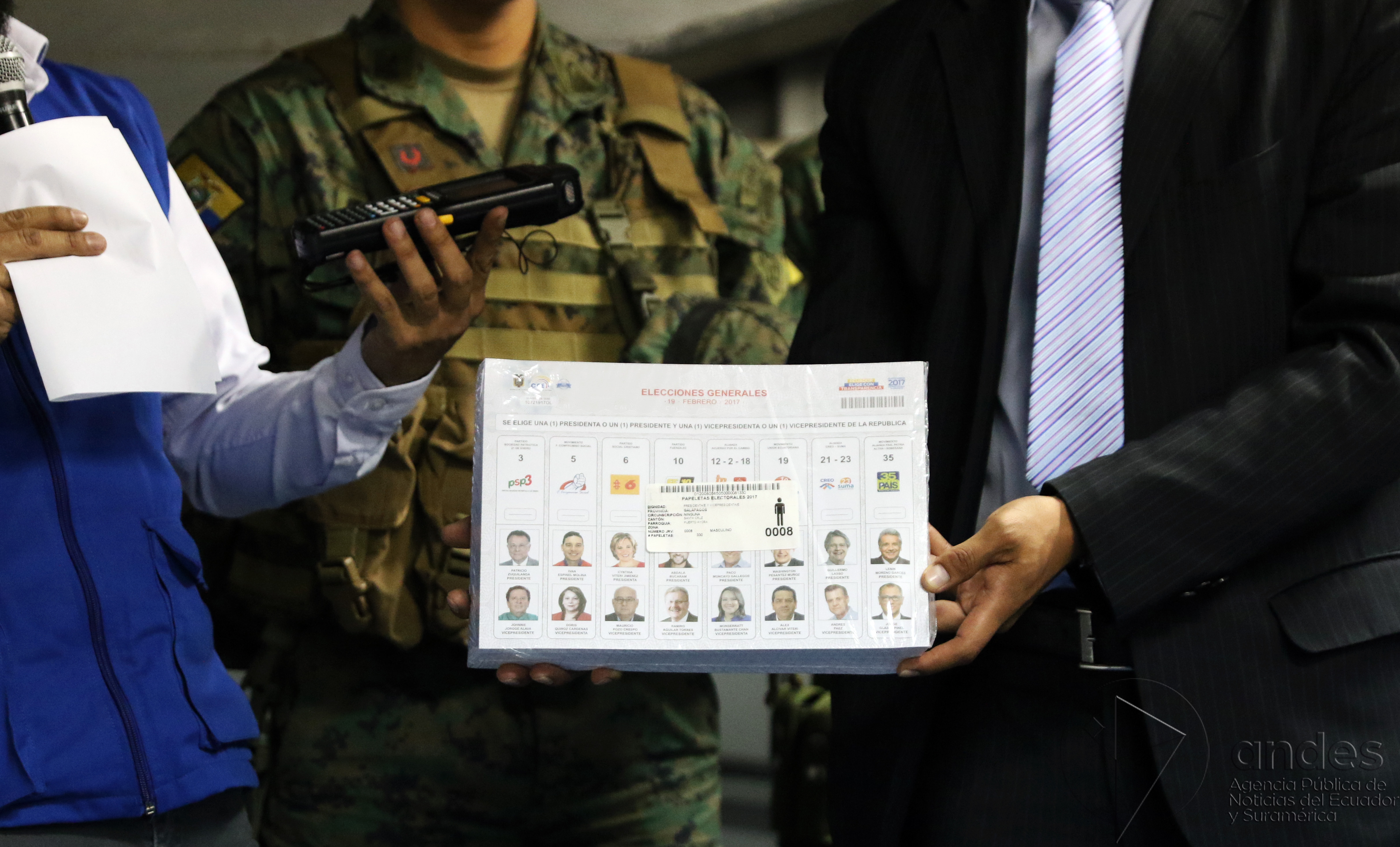 Quito, 25 enero de 2017 (Andes).- El CNE realiza la presentación del armado de los kits electorales en Cemexpo ubicado en la Mitad del Mundo. ANDES/Micaela Ayala V.